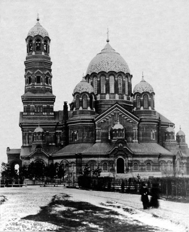 Самара. Кафедральный собор. Фотография. ~1900-е годы.